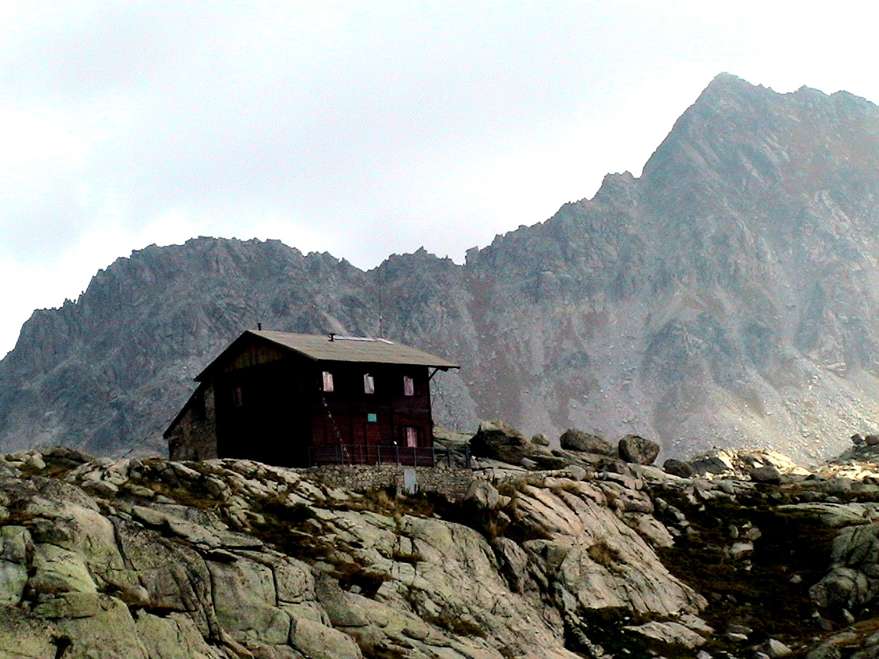 Refugi Colomina amb el pic de la Mainera al fons (Vall Fosca - Pallars Jussà)